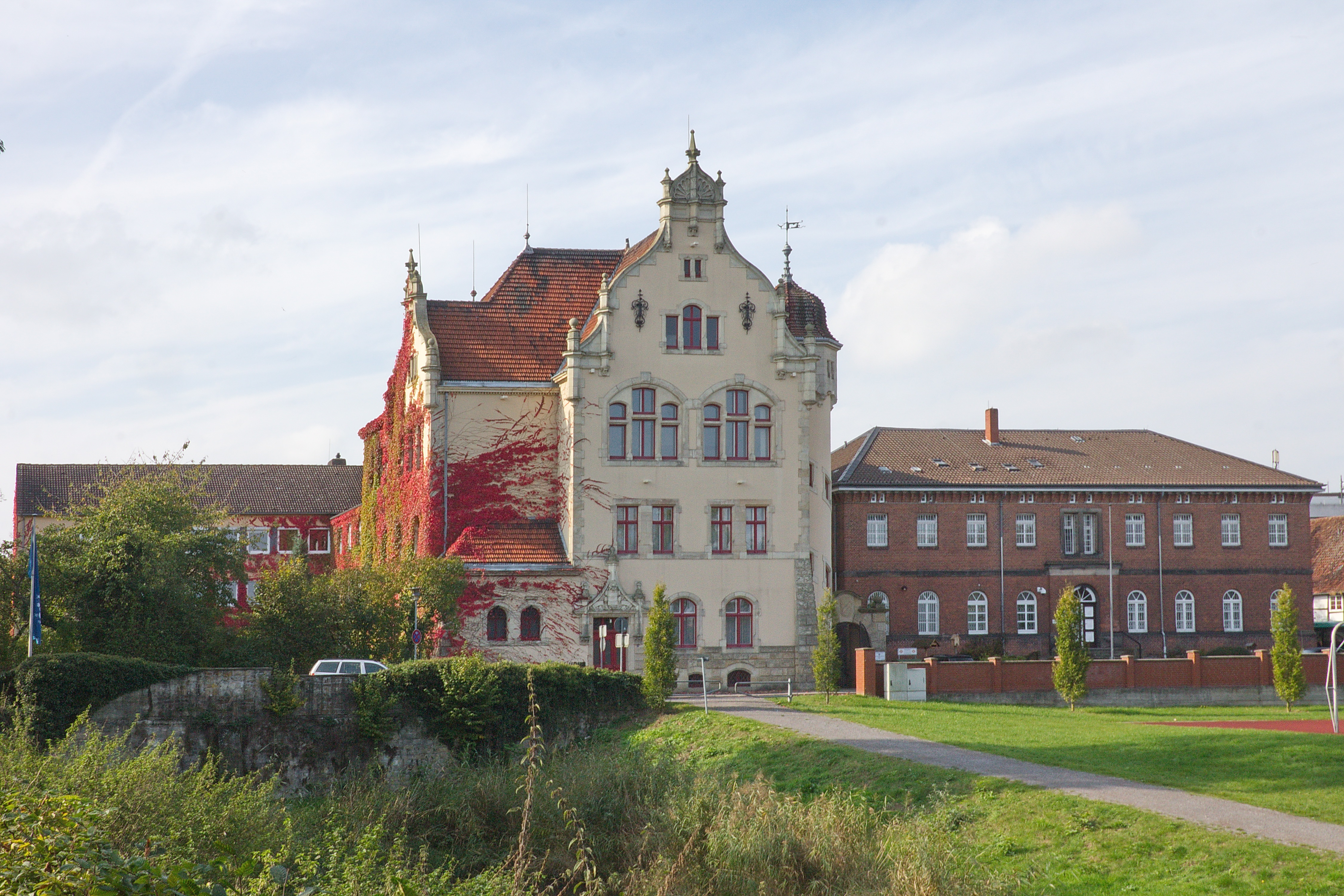 Amtsgericht in Neustadt am Rübenberge, Niedersachsen, Deutschland